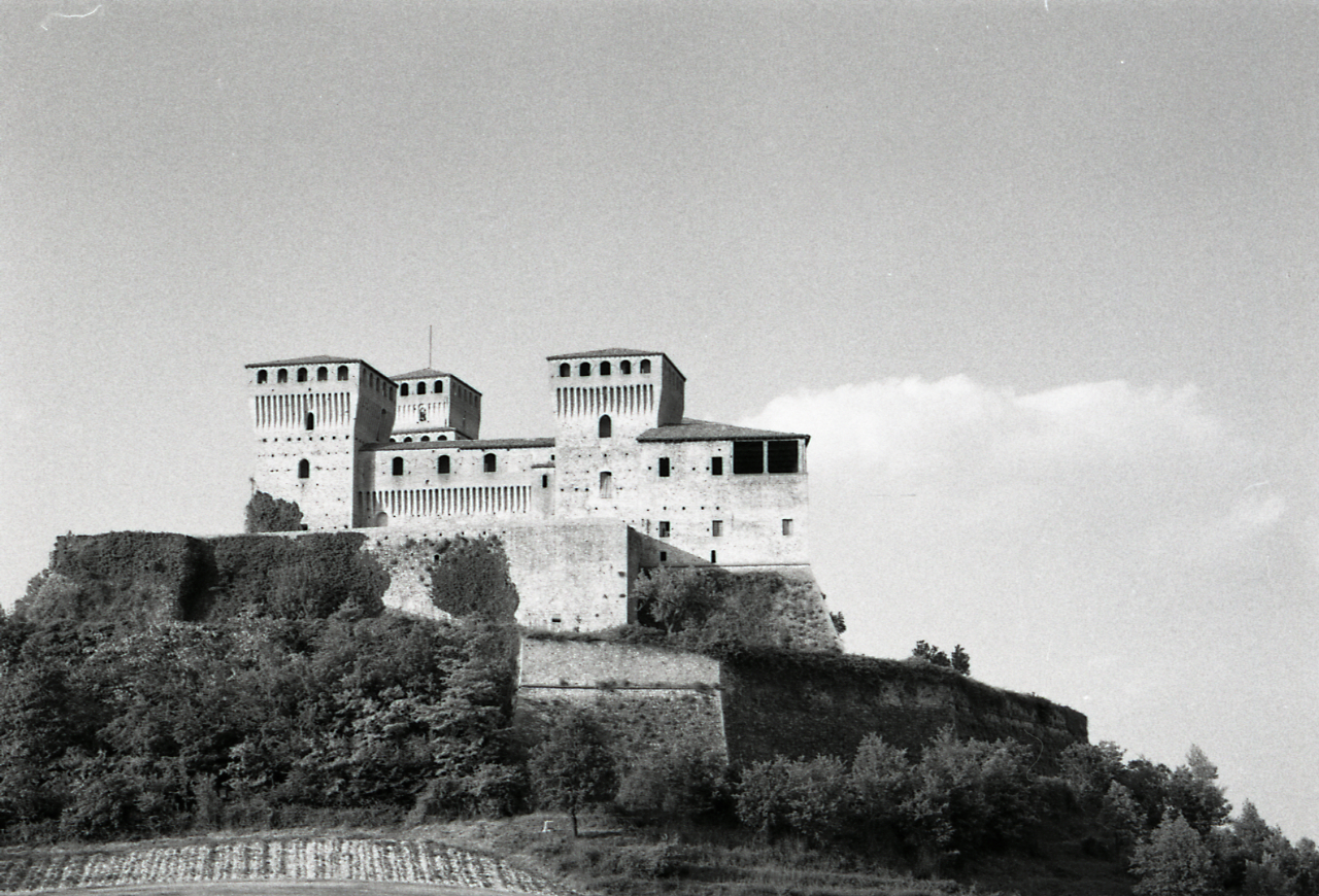 Servizio fotografico : Parma, 1976 / Paolo Monti. - Strisce: 3, Fotogrammi complessivi: 13 : Negativo b/n, gelatina bromuro d'argento/ pellicola ; 35 mm. - ((Sul portanegativi: N[I]K[MA]T FP4. - All'interno del portanegativi: la serie è anche identificata da una linea verticale e orizzontale a pennarello nero che separa la suddetta serie dalla precedente di soggetto diverso. - Occasione: Documentazione monumenti artistici Emilia-Romagna. - Fonte: Agenda di Paolo Monti: Leica 1501-3000 Controllo numerazione (1950-1978), presso Archivio Paolo Monti. - Fonte: Fattura di Paolo Monti: IV. Commesse/ Fattura n. 09/ Fotografie monumenti artistici Emilia-Romagna (1976/07/05), presso Archivio Paolo Monti